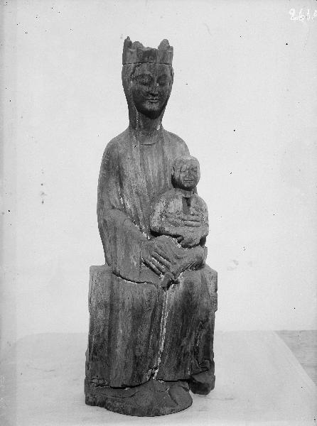 Träskulptur, Madonnan med barnet, andra hälften av 1200-talet. Kategori: (05) SkulpturerTräskulptur, Madonnan med barnet, andra hälften av 1200-talet.